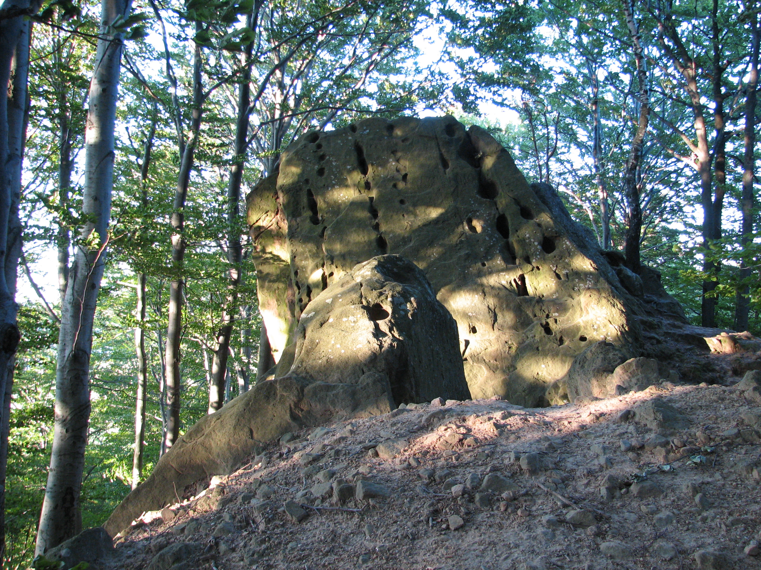 Čertův kámen